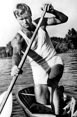 Andrei Igorov